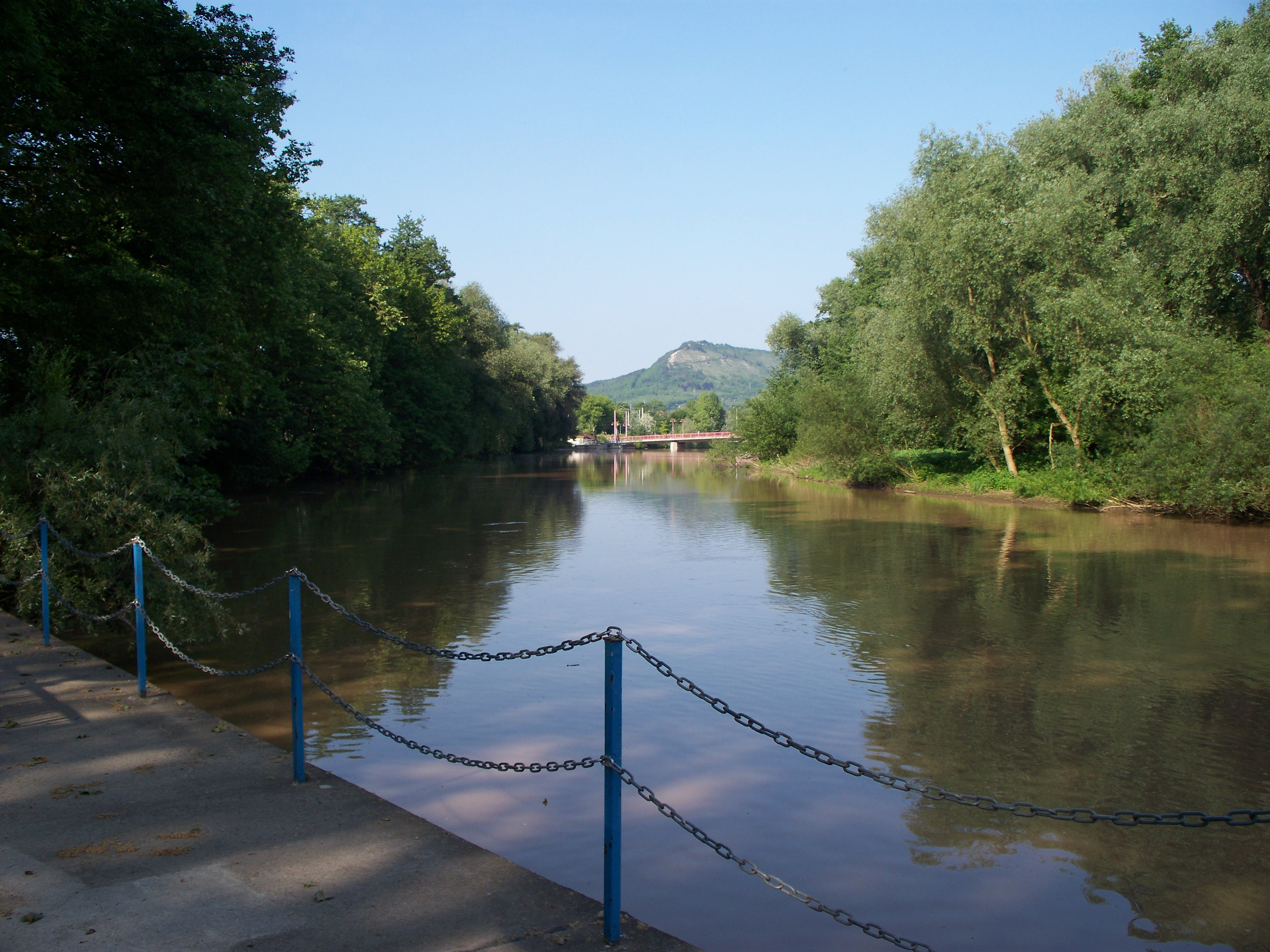 Jenzig vom Jenaer "Volkspark Oberaue" gesehen